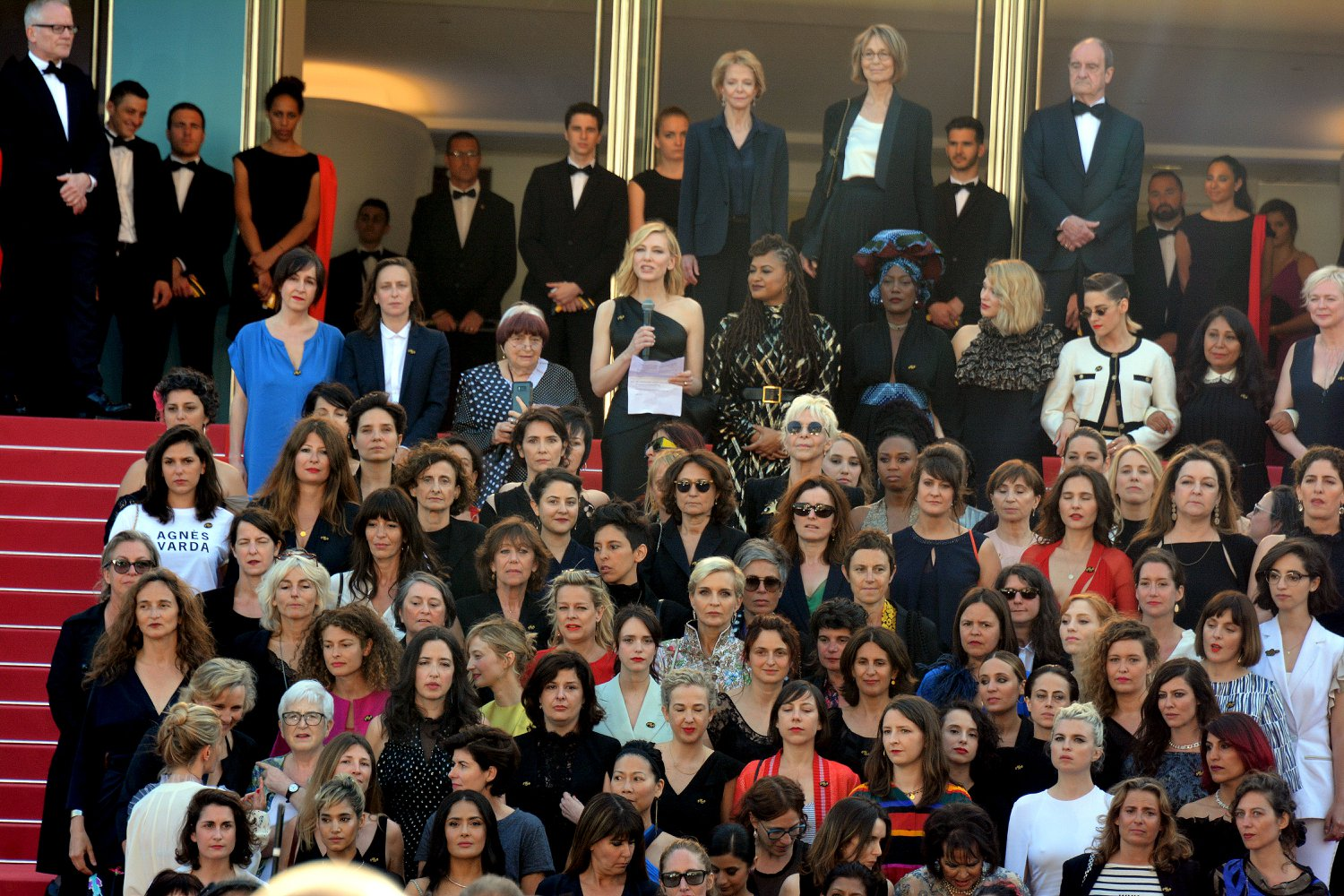 Manifestation pour l'égalité salariale et la parité dans le cinéma, organisée pendant le festival de Cannes